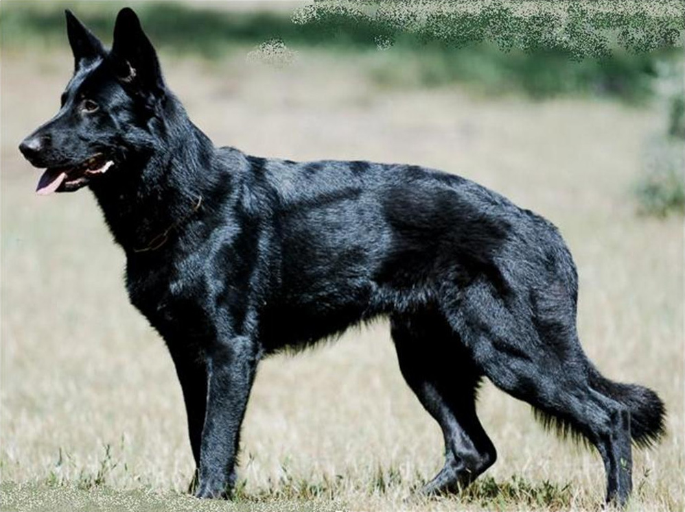 Pastor Alemán Negro Sólido